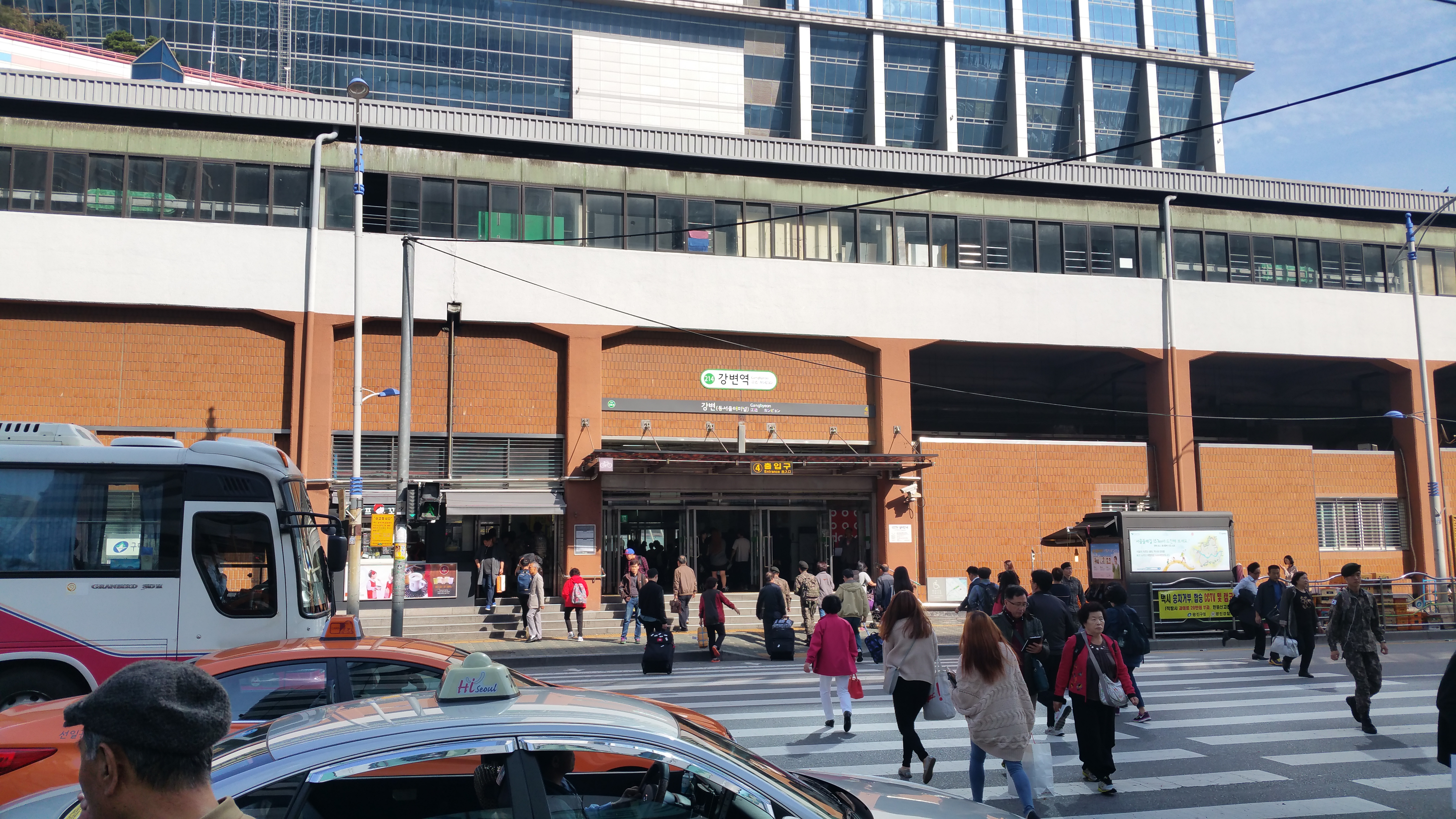 강변역 2호선